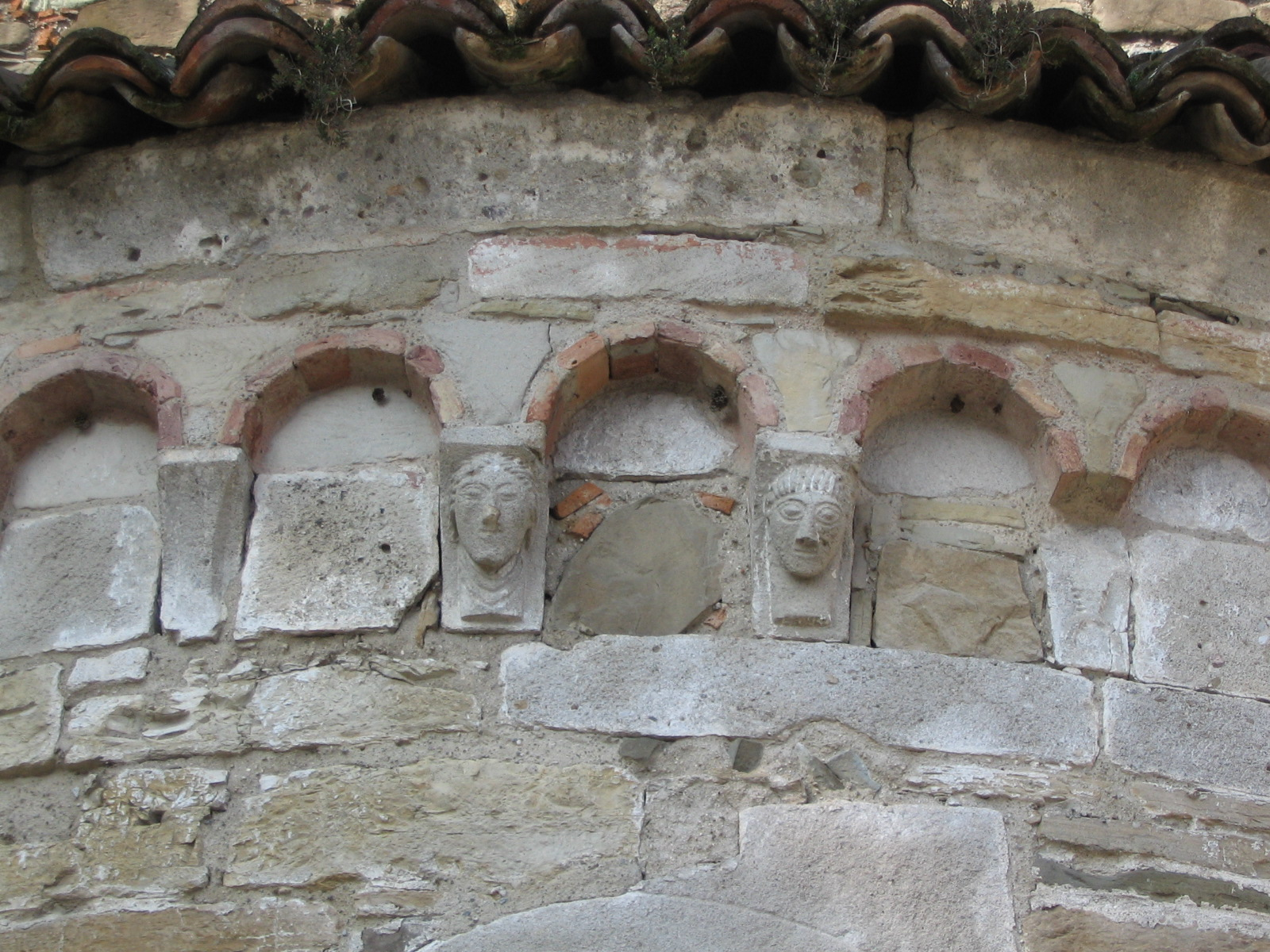 Basilica di Santa Giulia, abside superstite, nel comune di Bonate Sotto.